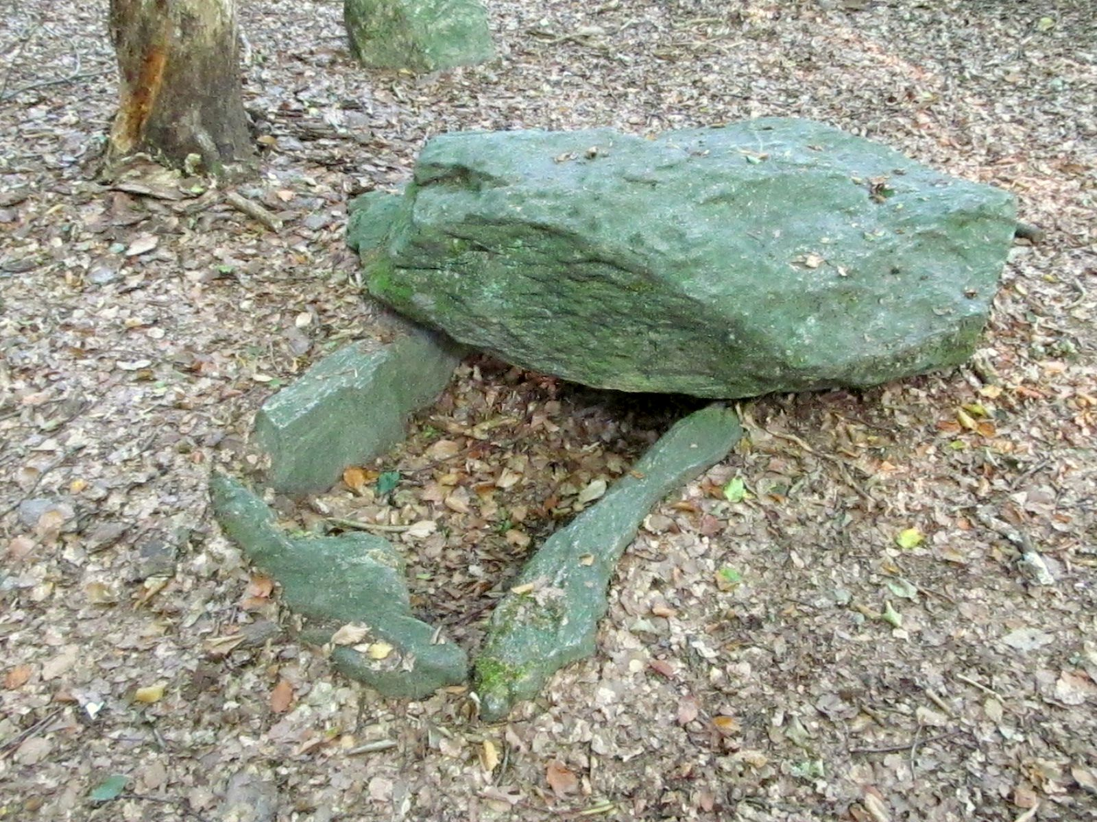 Steinkiste im Uelzener Stadtwald, steinzeitliches Megalithgrab in Uelzen, Niedersachsen